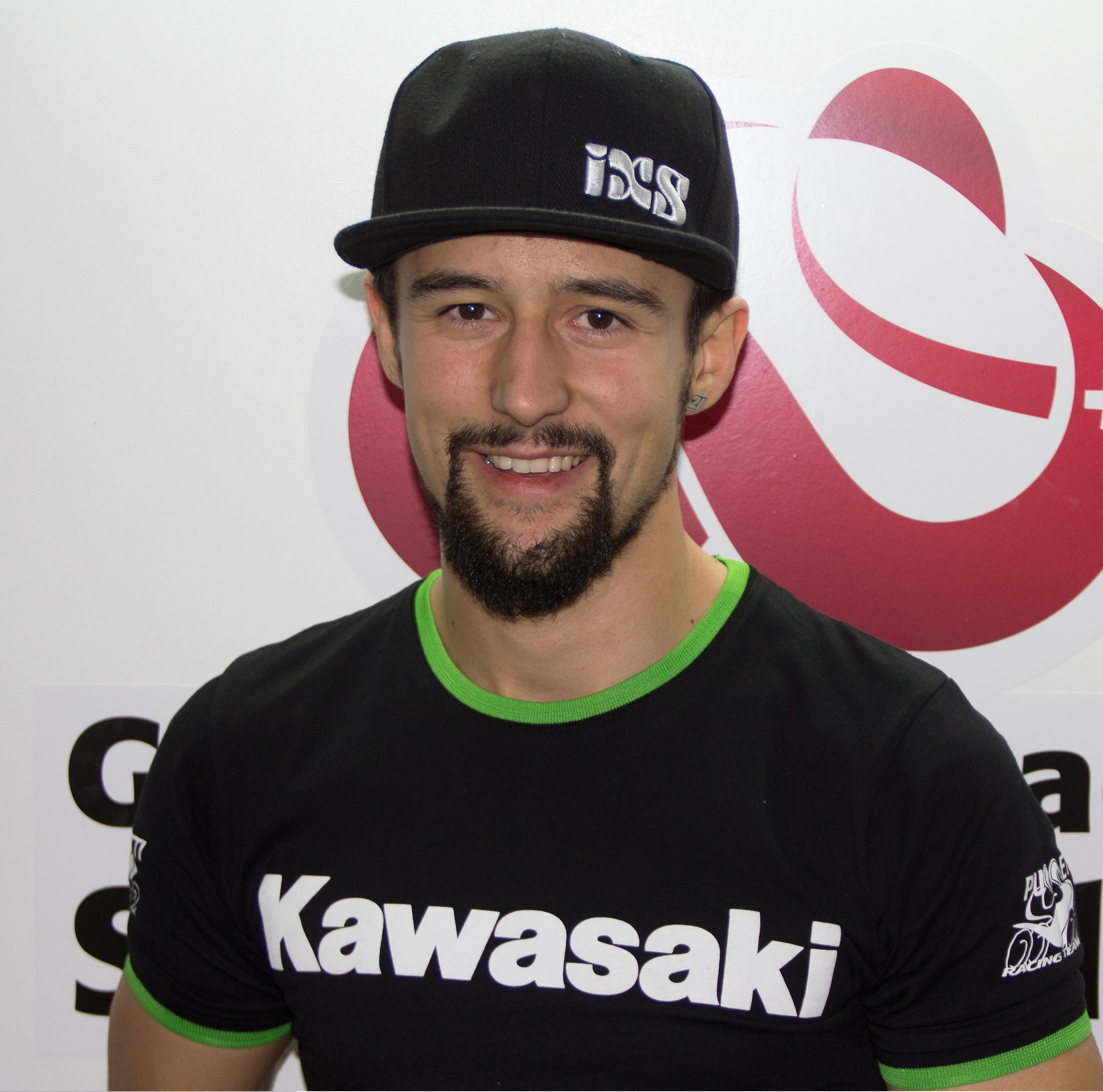 Portrait picture of Randy Krummenacher